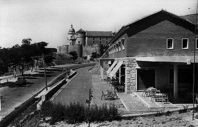 Archivo y Parador - Simancas (Valladolid) - Ediciones Arribas - Zaragoza. Vista del Parador en primer plano y el Archivo de Simancas al fondo. - Tarjeta postal. Papel 139 x 92 B/N